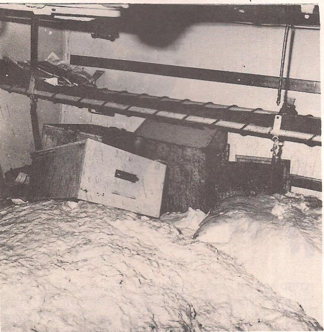 אטימת מדורים שנפגעו באמצעות פוליסטירן מוקצף